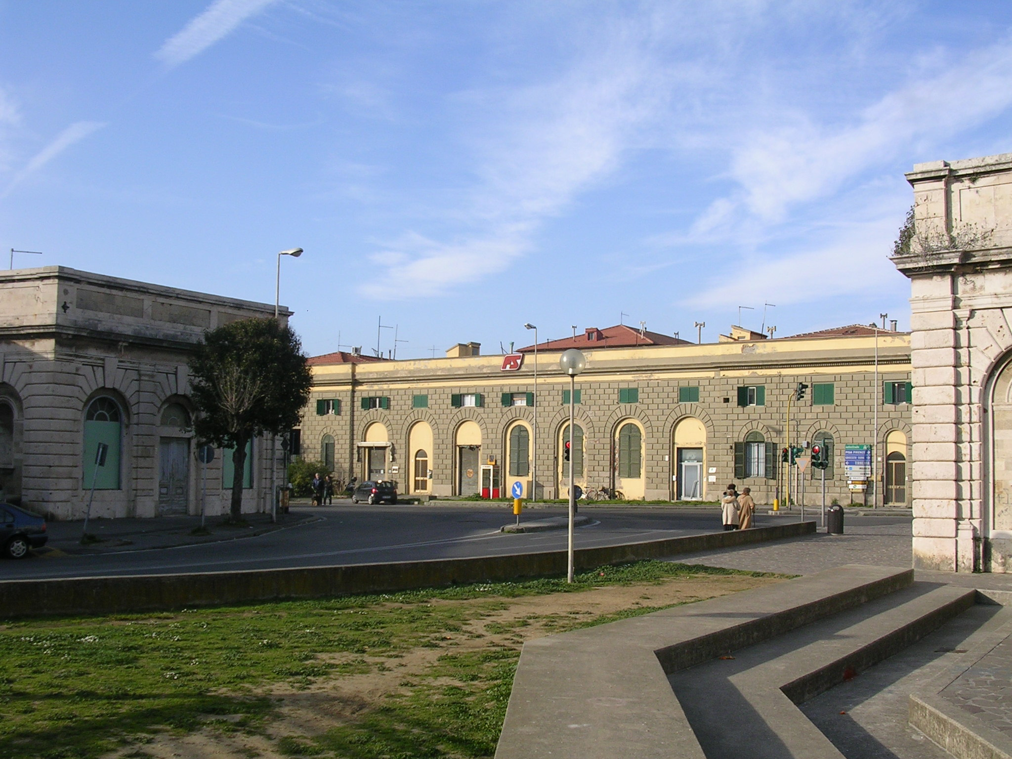 Livorno: la Stazione di San Marco (XIX secolo), in origine provvista di una volta metallica semicircolare a protezione dei binari. In primo piano il varco doganale delle Mura Leopoldine: la Barriera San Marco, aperta a lato della più antica Porta San Marco.